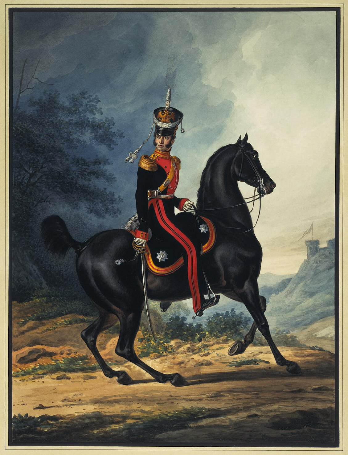 Зауервейд, Александр Иванович - Штаб-офицер лейб-гвардии Драгунского полка